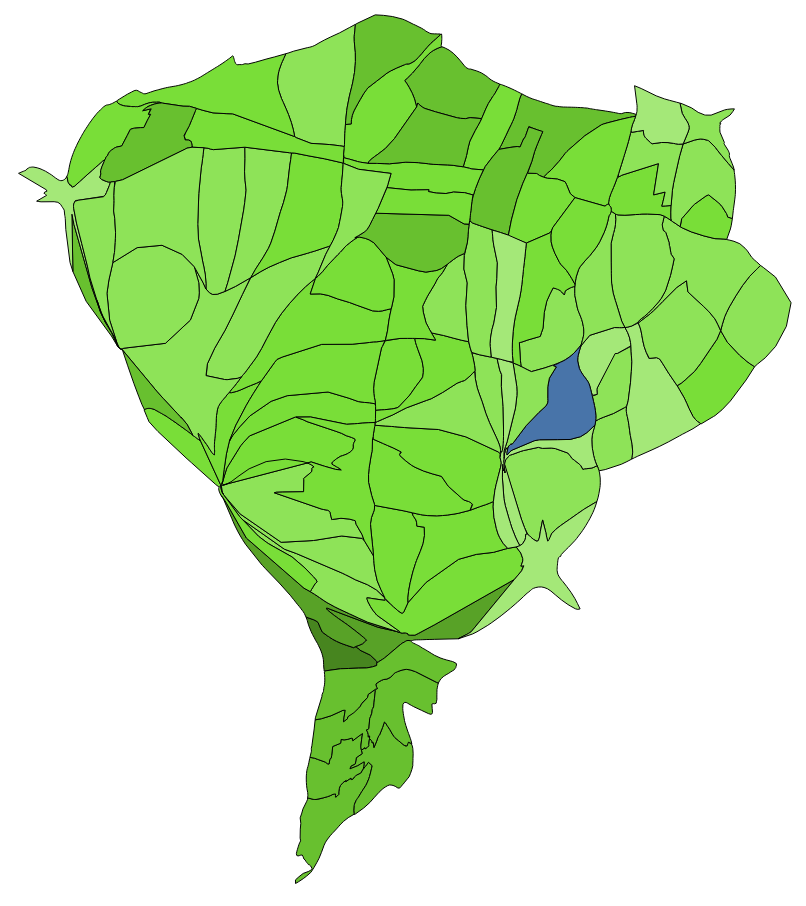 中文（台灣）: 顏色對照表